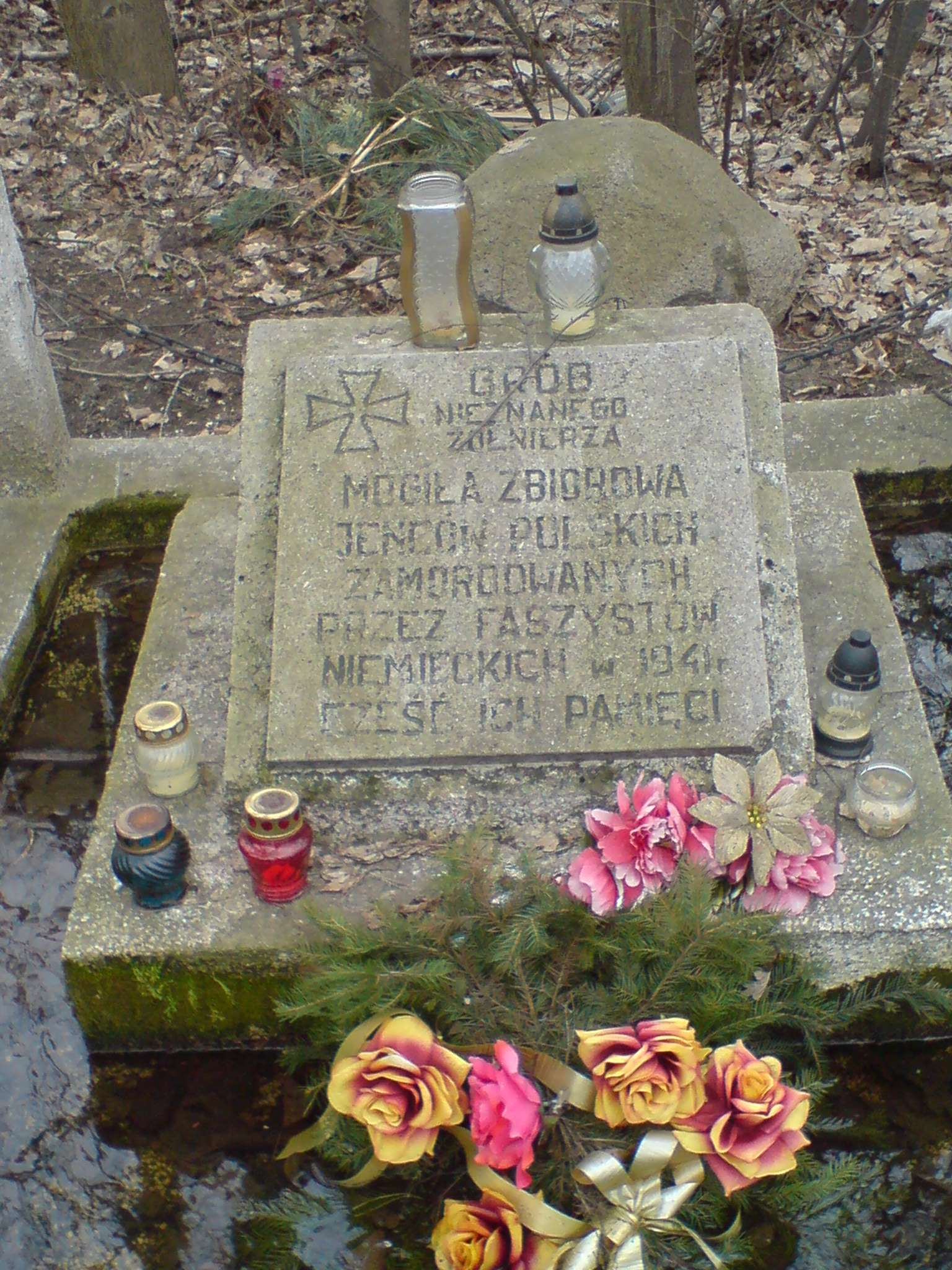 Pamiątkowa płyta ku czci pomordowanych ok. 200 osób w miejscu rozstrzelania, przy drodze numer 815 Lubartów - Parczew w miejscowości Pałecznica-Kolonia.